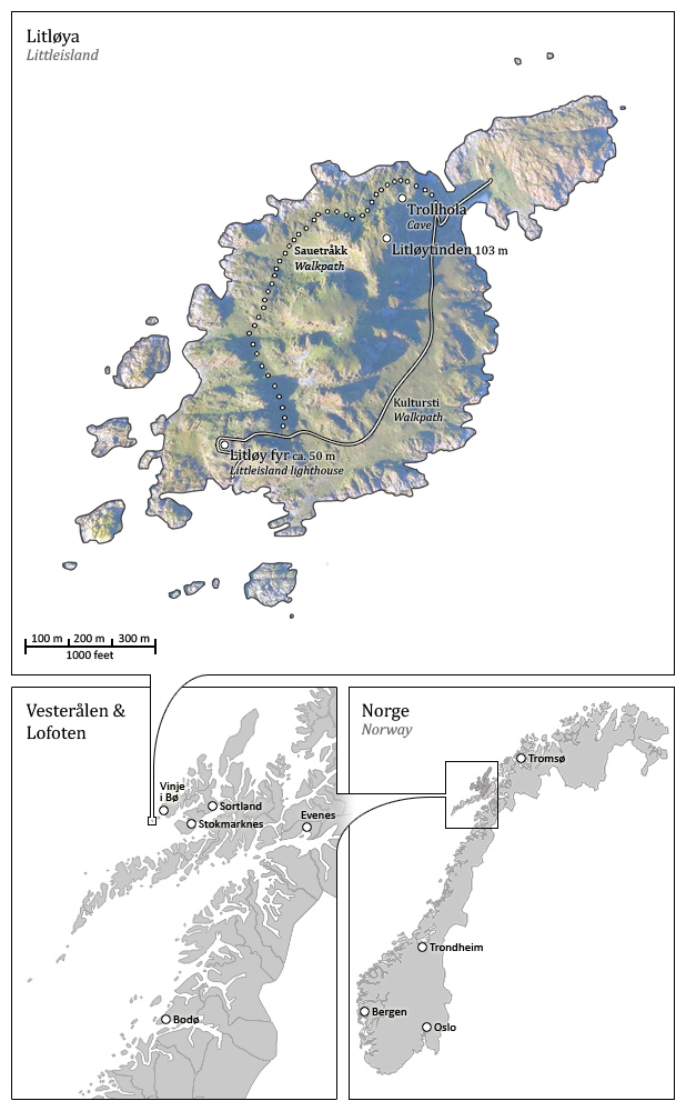 Map of Litløya, an island in Vesterålen overlooking Lofoten.